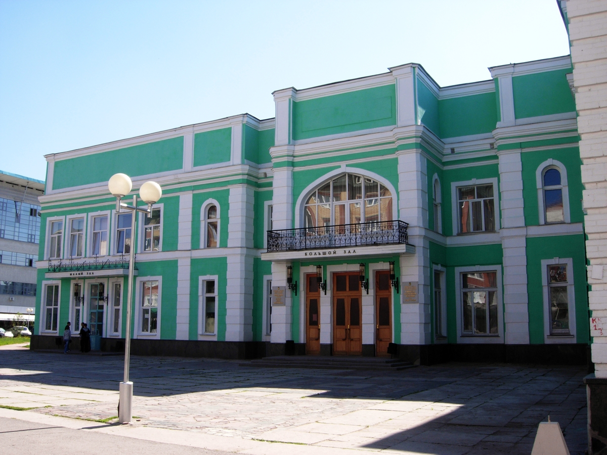 Здание Башгосфилармонии в Уфе